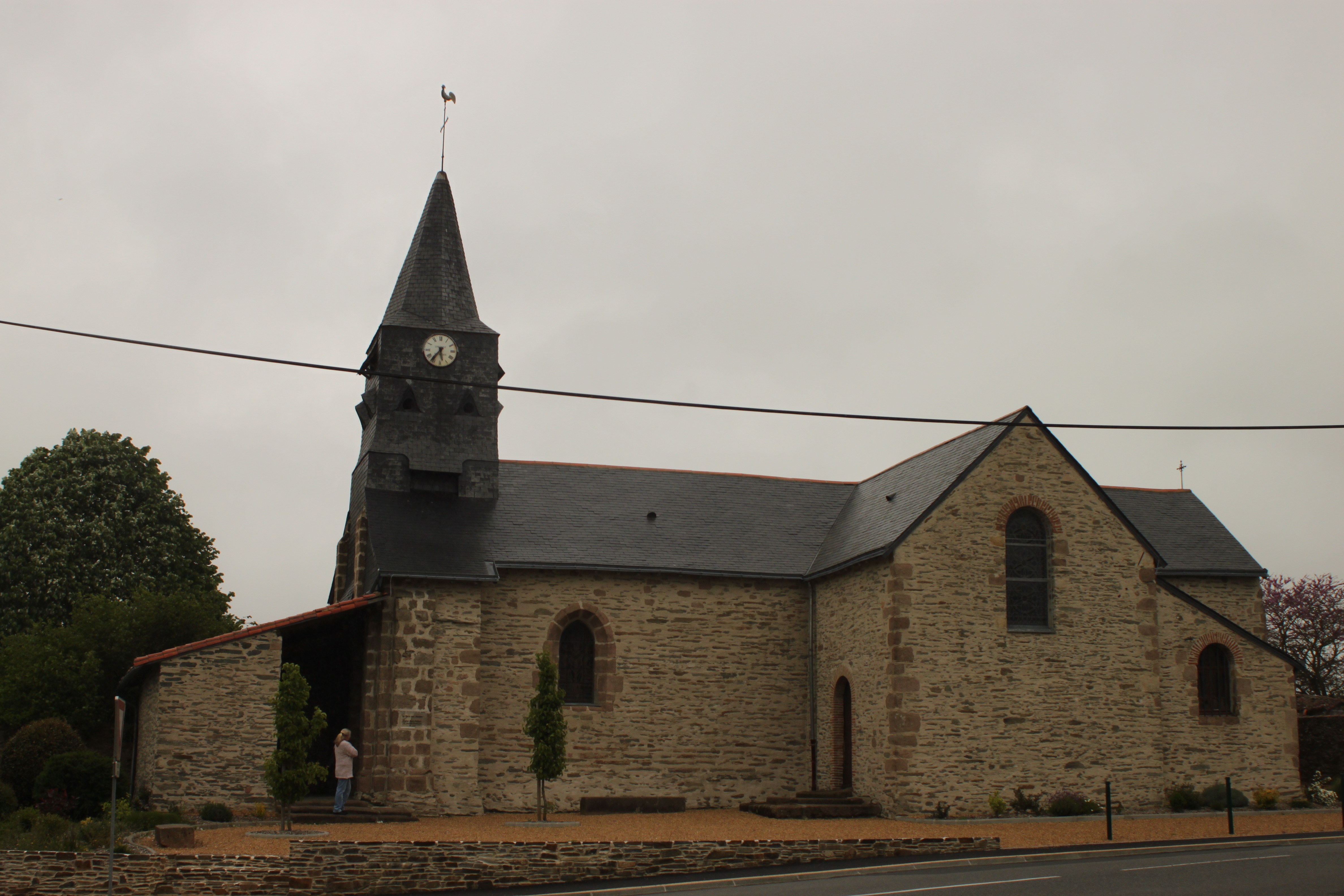 Église Saint-Philbert, XII°-XIV°-XVII°-XVIII°, Fr-49-Saint-Philbert-en-Mauges.